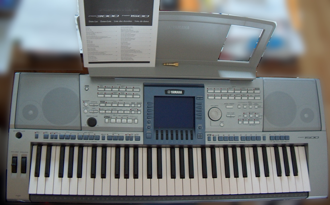 Yamaha PSR1500 Arranger Workstation